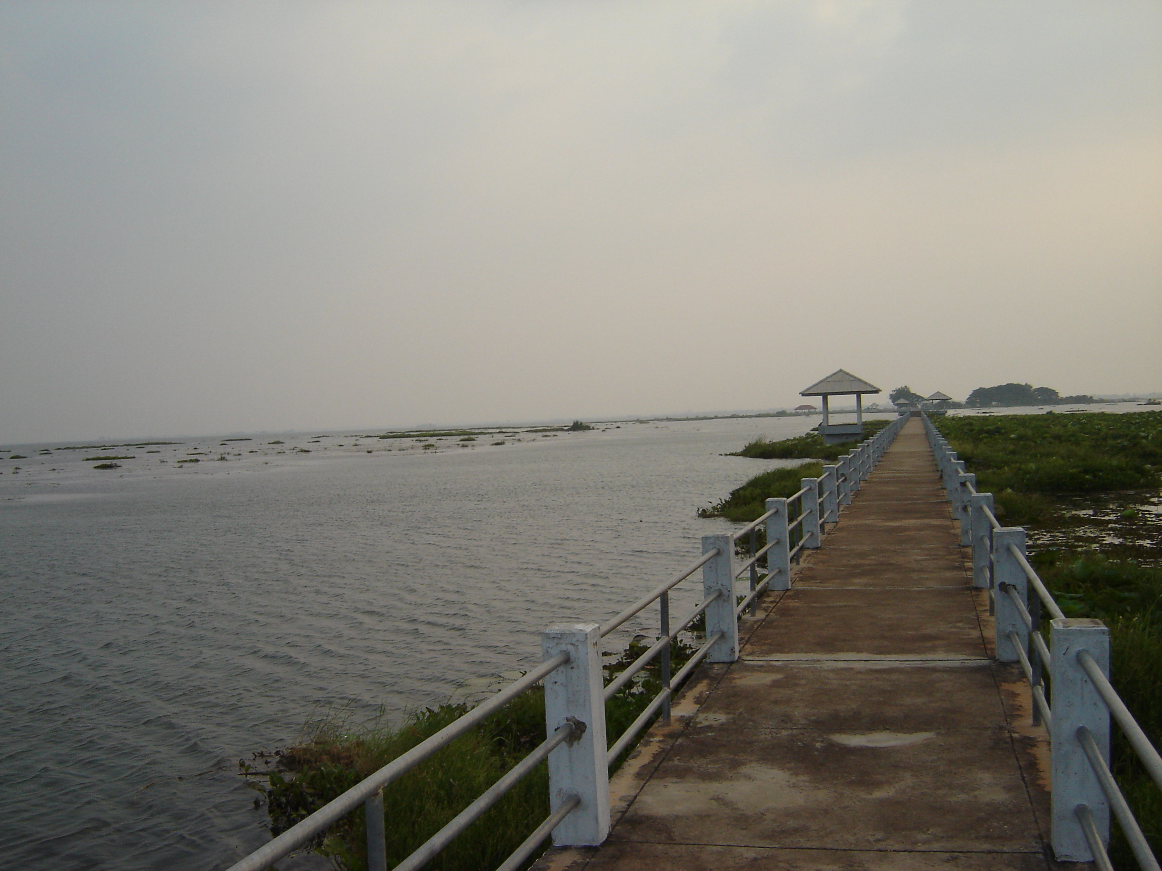 Nong Han Lake